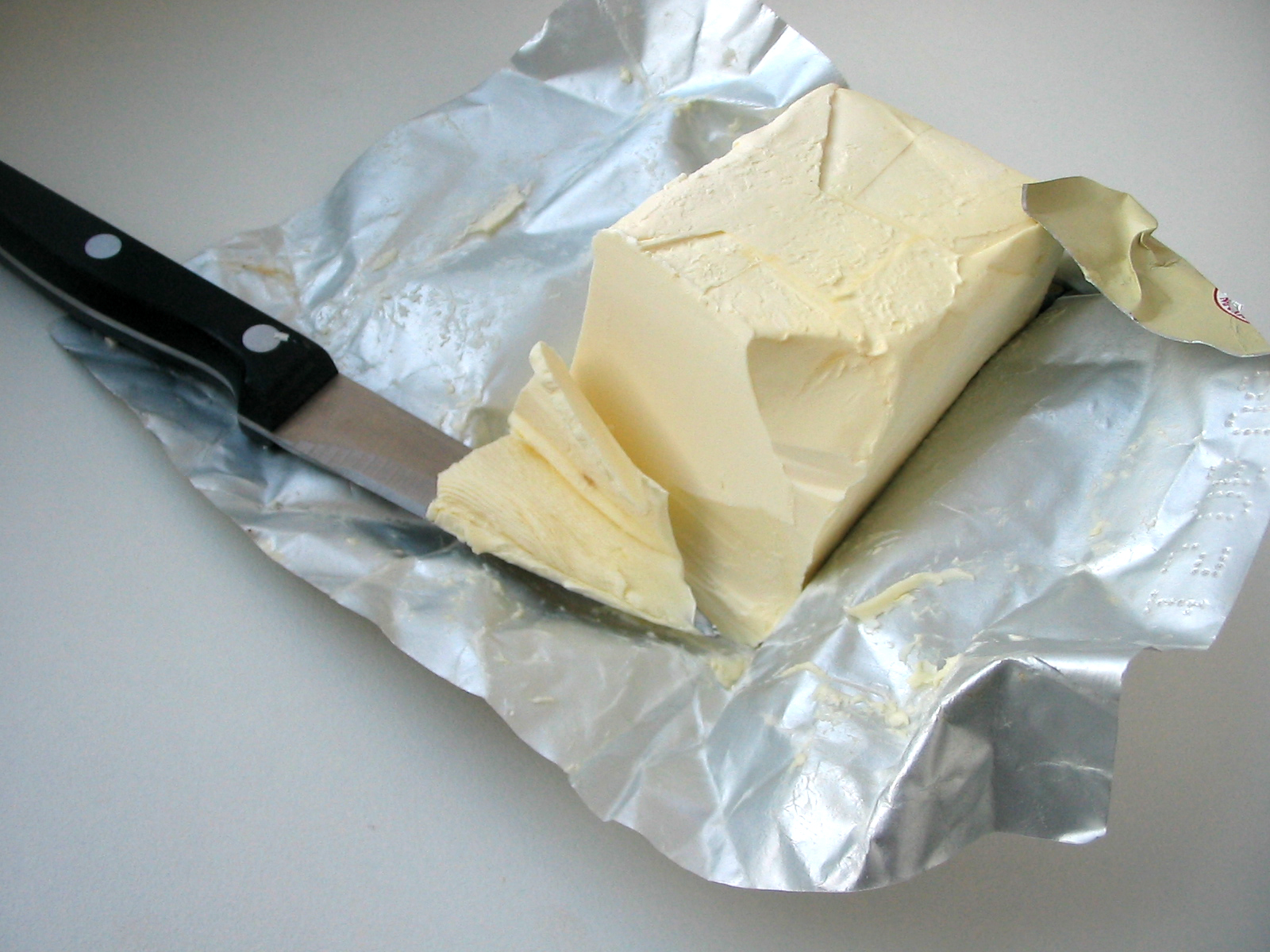 пачка маргарину